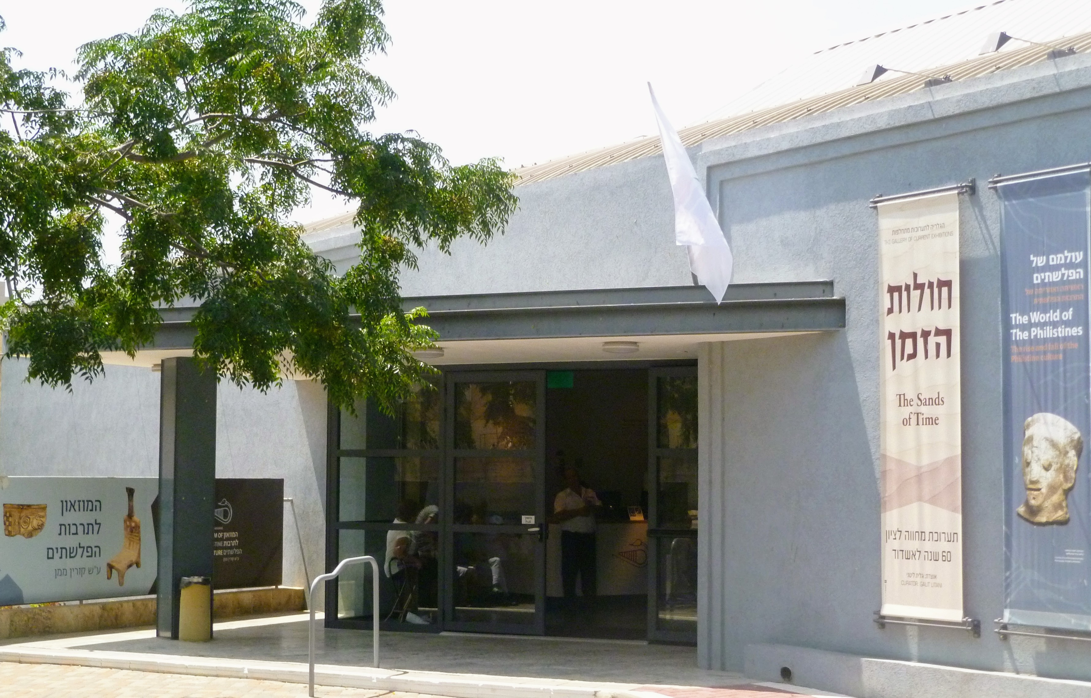 חזית המבנה